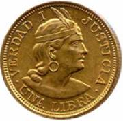 Moneda peruana de una Libra de oro de 1918 (reverso)